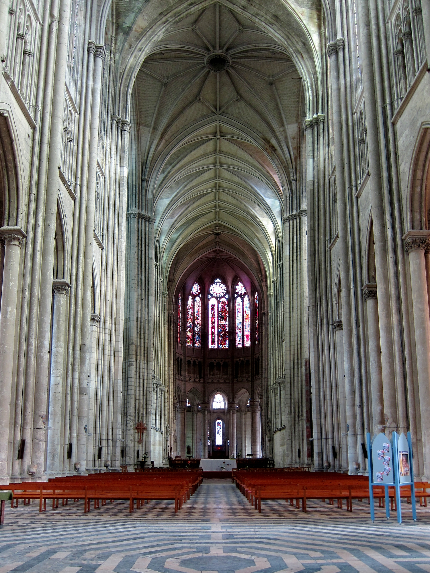 Nef de la basilique Saint Quentin de Saint-Quentin (Aisne).